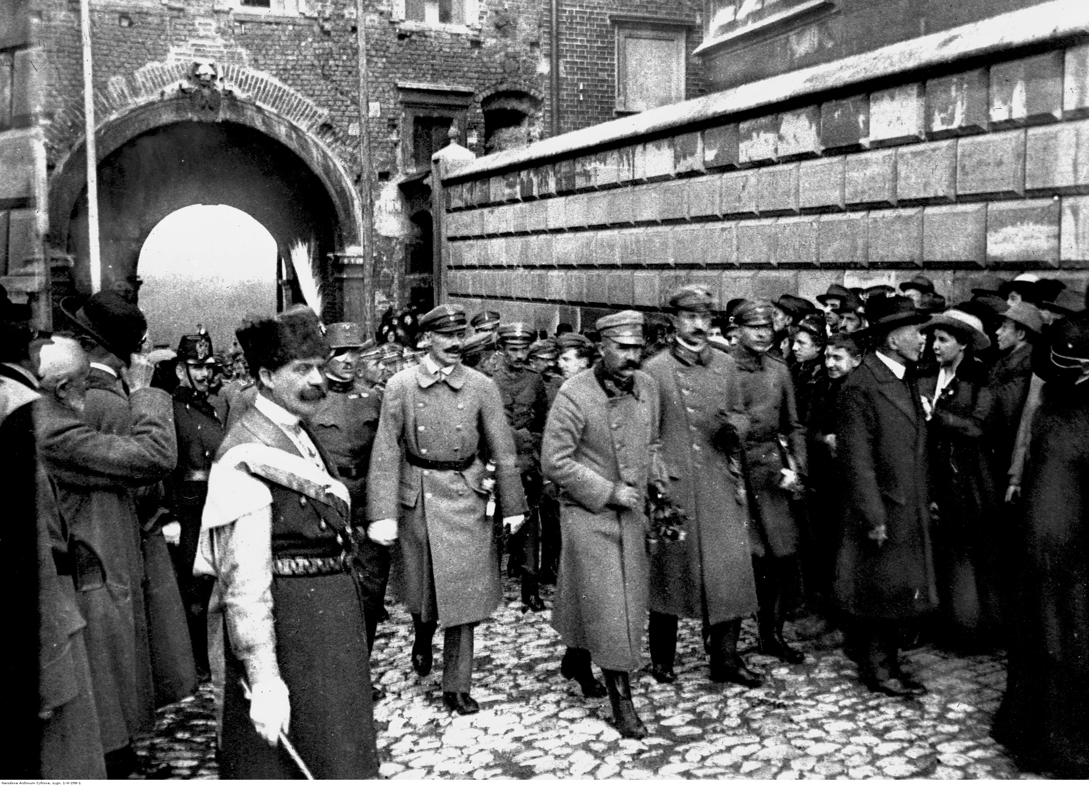 Święto Zjednoczenia Armii Polskiej - Naczelnik Państwa Józef Piłsudski na Wawelu; 10 październik 1919 r. Koncern Ilustrowany Kurier Codzienny - Archiwum Ilustracji. Sygnatura: 1-H-298-1